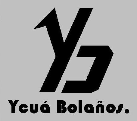 Logo del siniestrado supermercado Ycua bolaños de Asunción, Paraguay